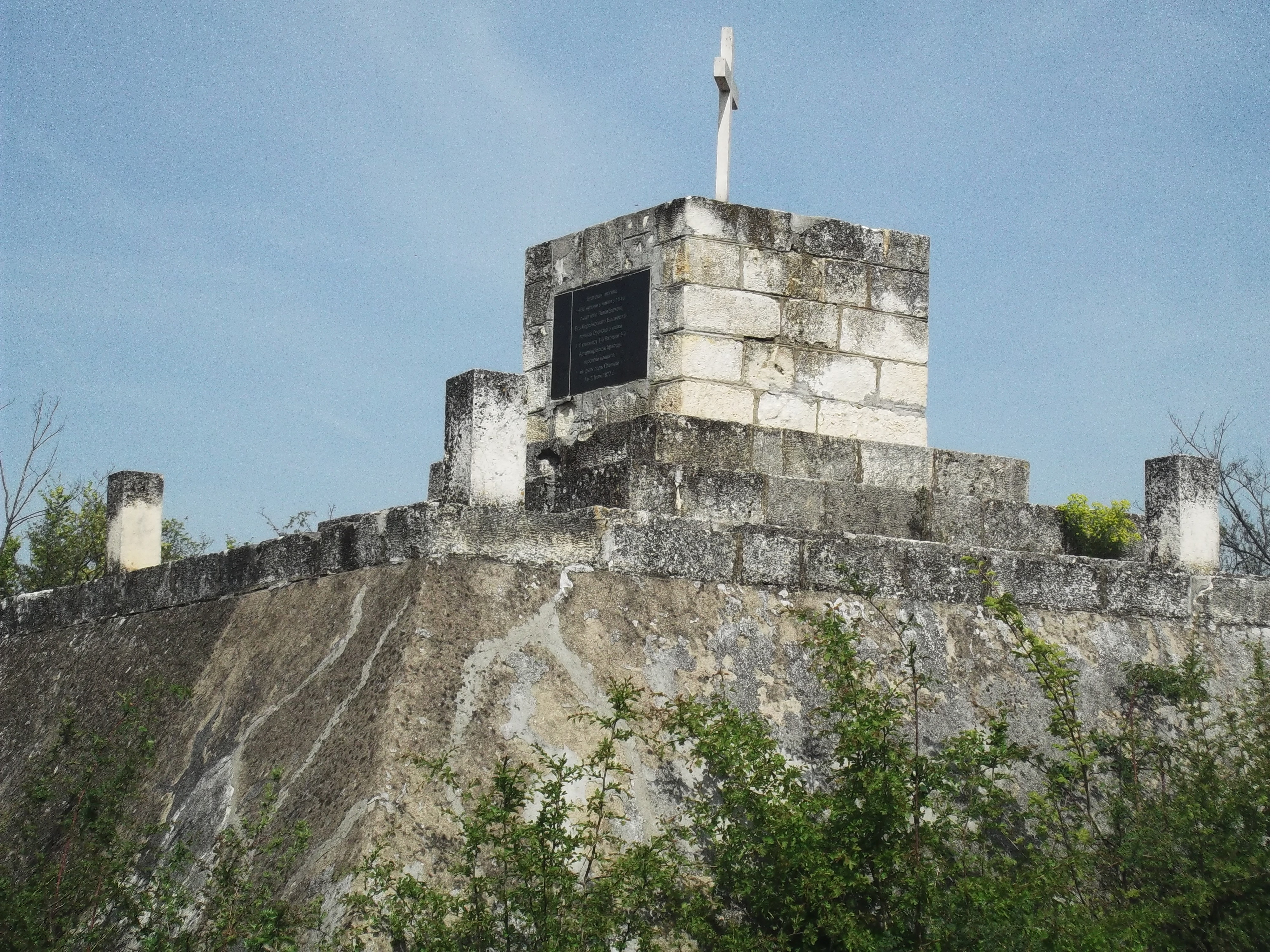 Паметник край село Буковлък на загиналите на 20 юли 1877 г. офицери и войници от 18 вологодски пехотен полк